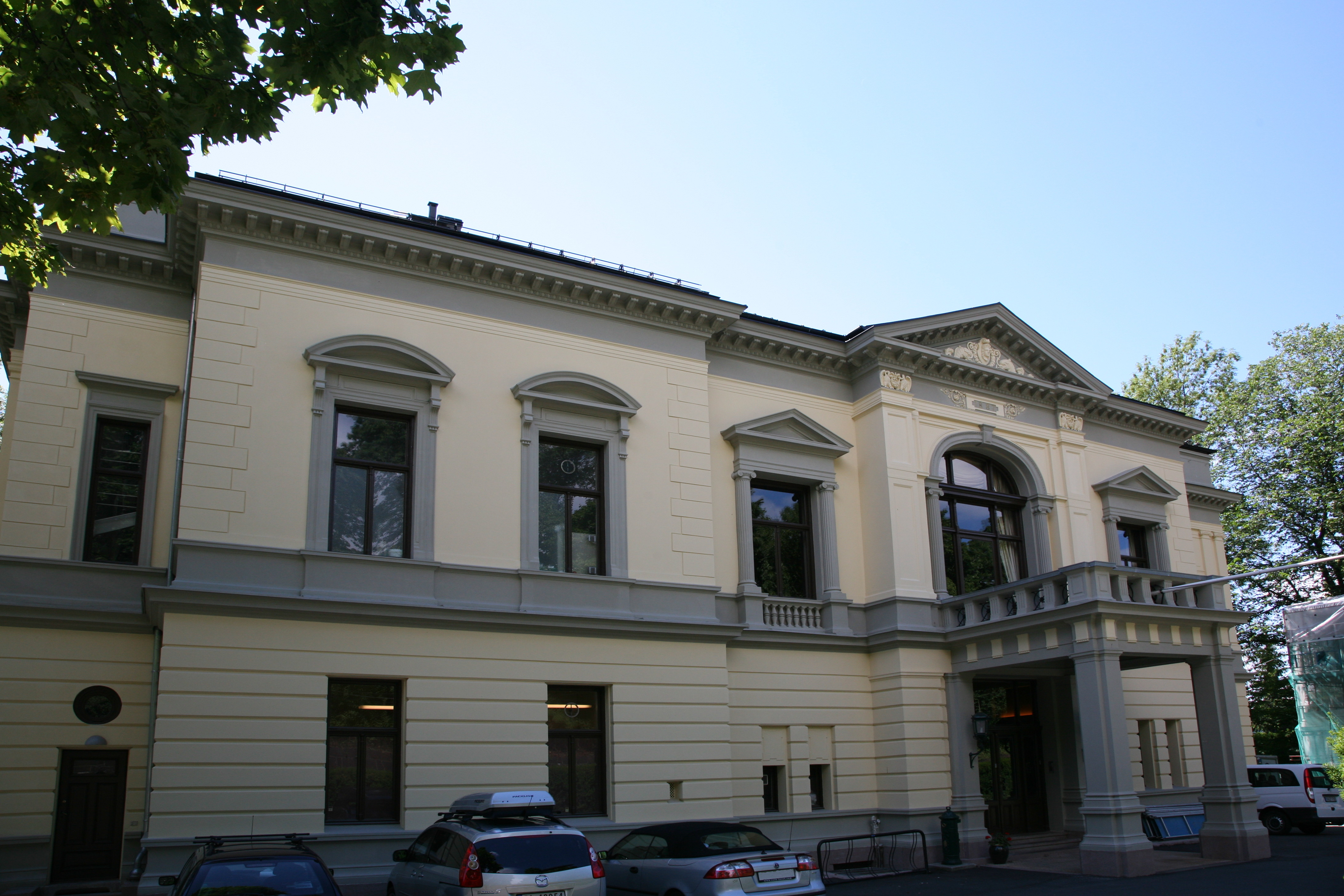 The building of Det Norske Videnskaps-Akademi in Drammensveien 78 in Oslo